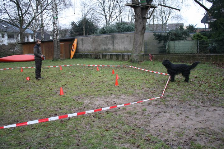 Longieren mit Hund, Stoppen des Hundes durch Drehung des Oberkörpers des Menschen zum Hund